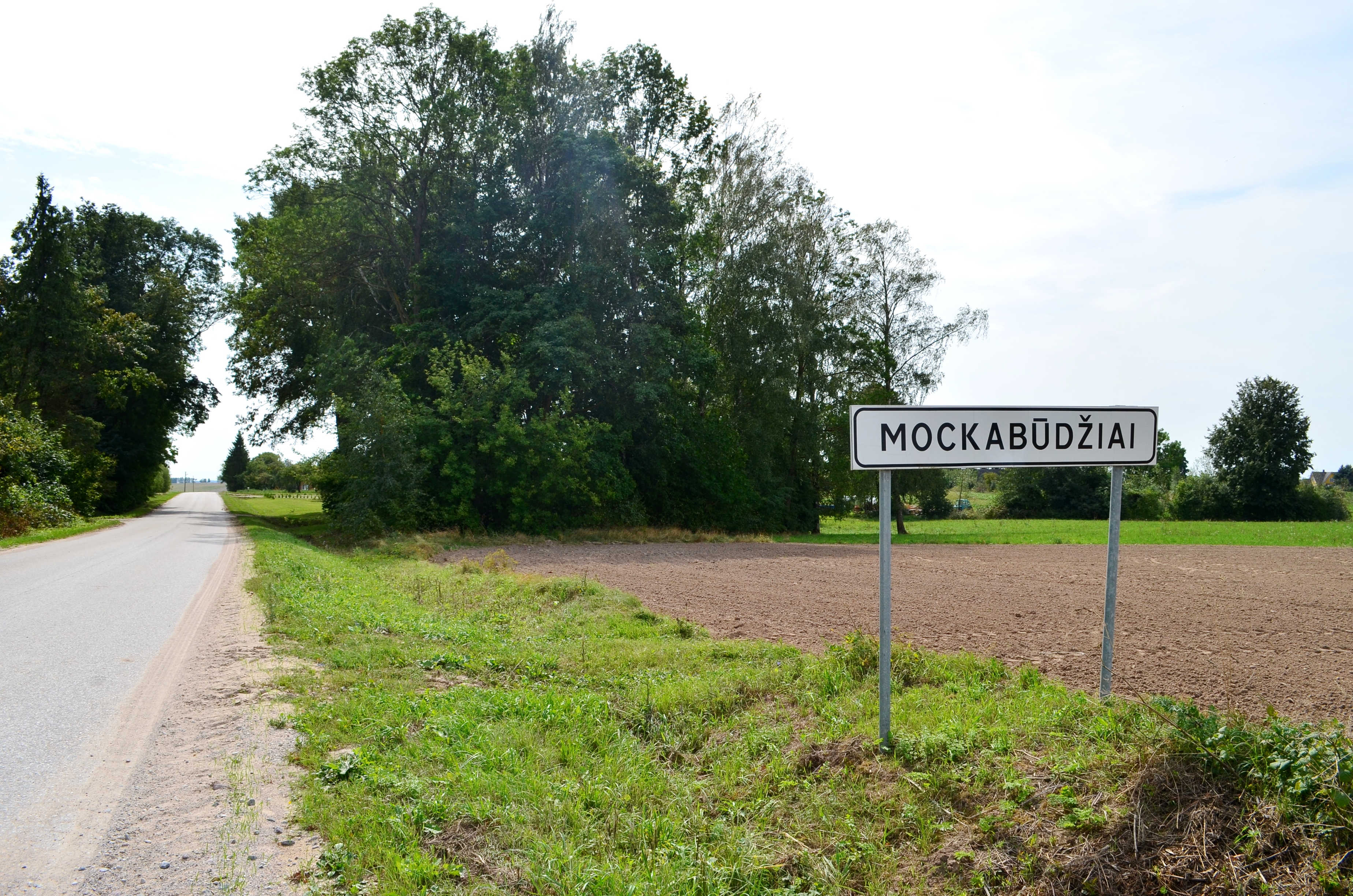 Mockabūdžiai, Vilkaviškio raj.